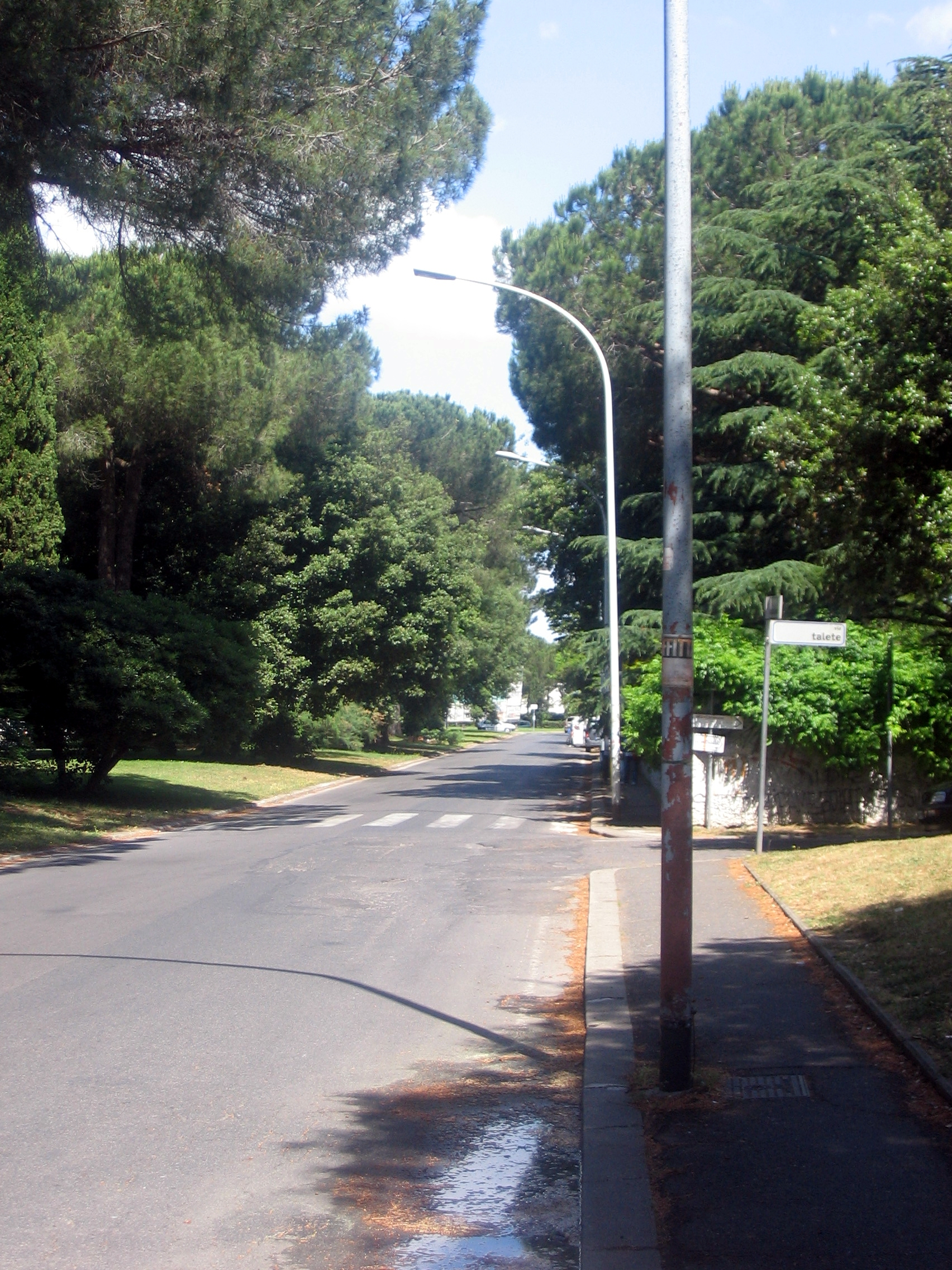 Casalpalocco, Roma